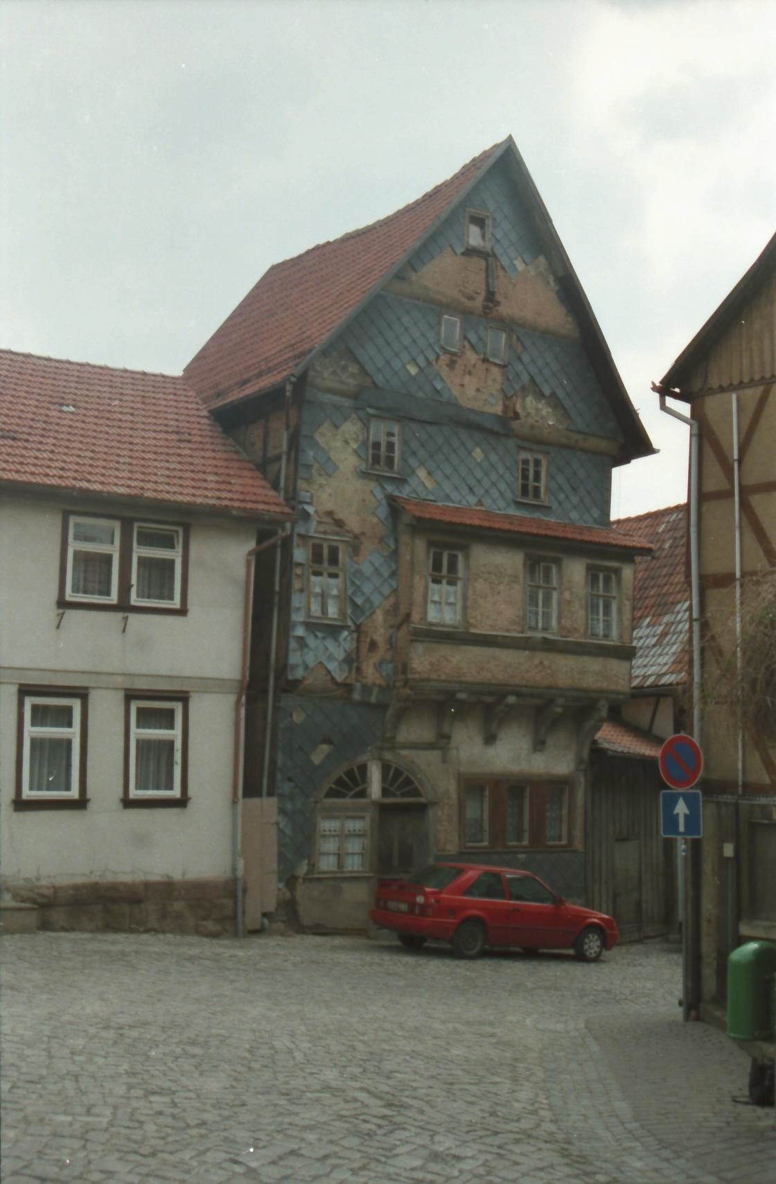 Das älteste Haus in der Altstadt von Treffurt - vor der Sanierung.